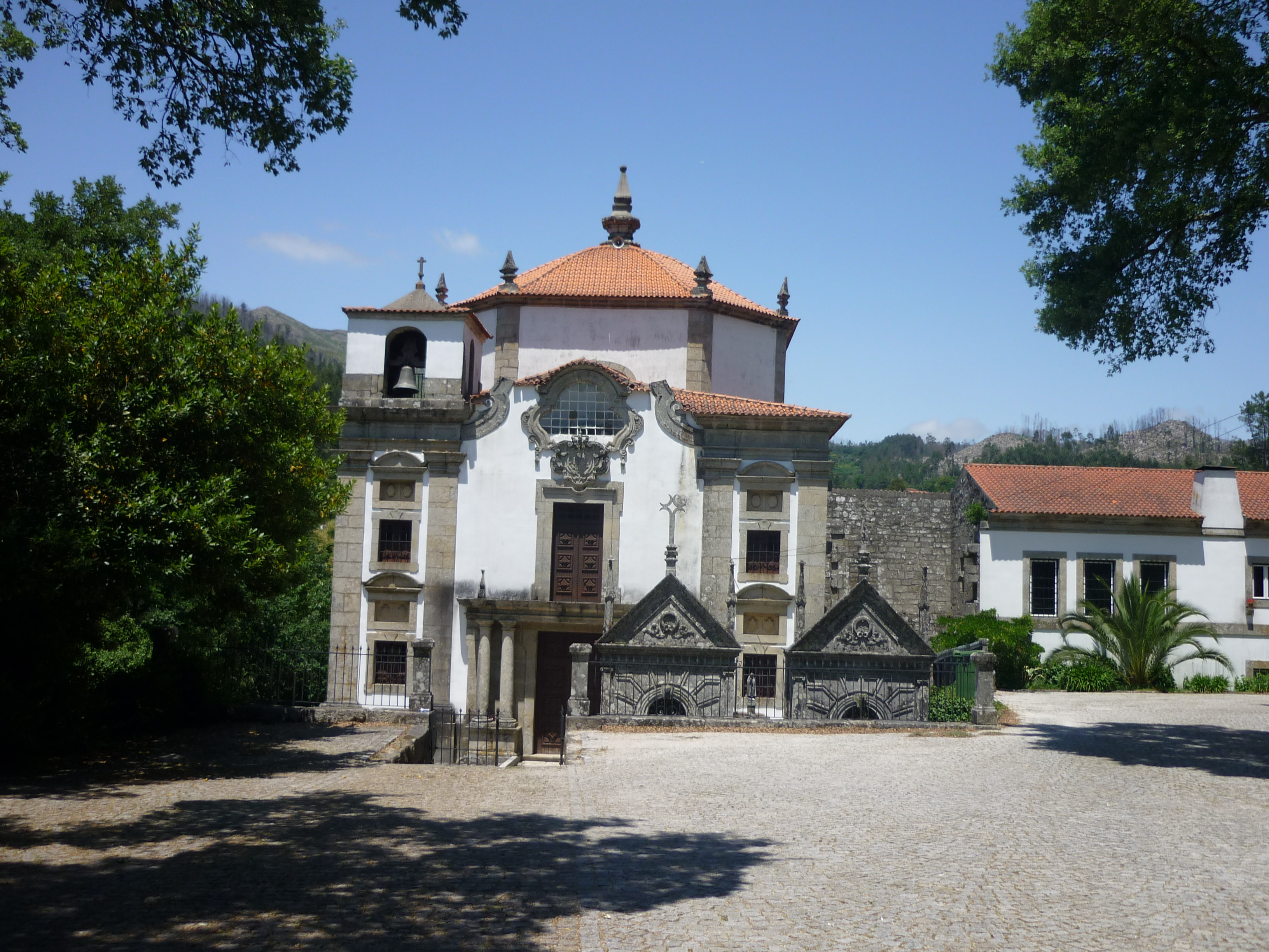 Kloster Sao Cristovao in Lafoes